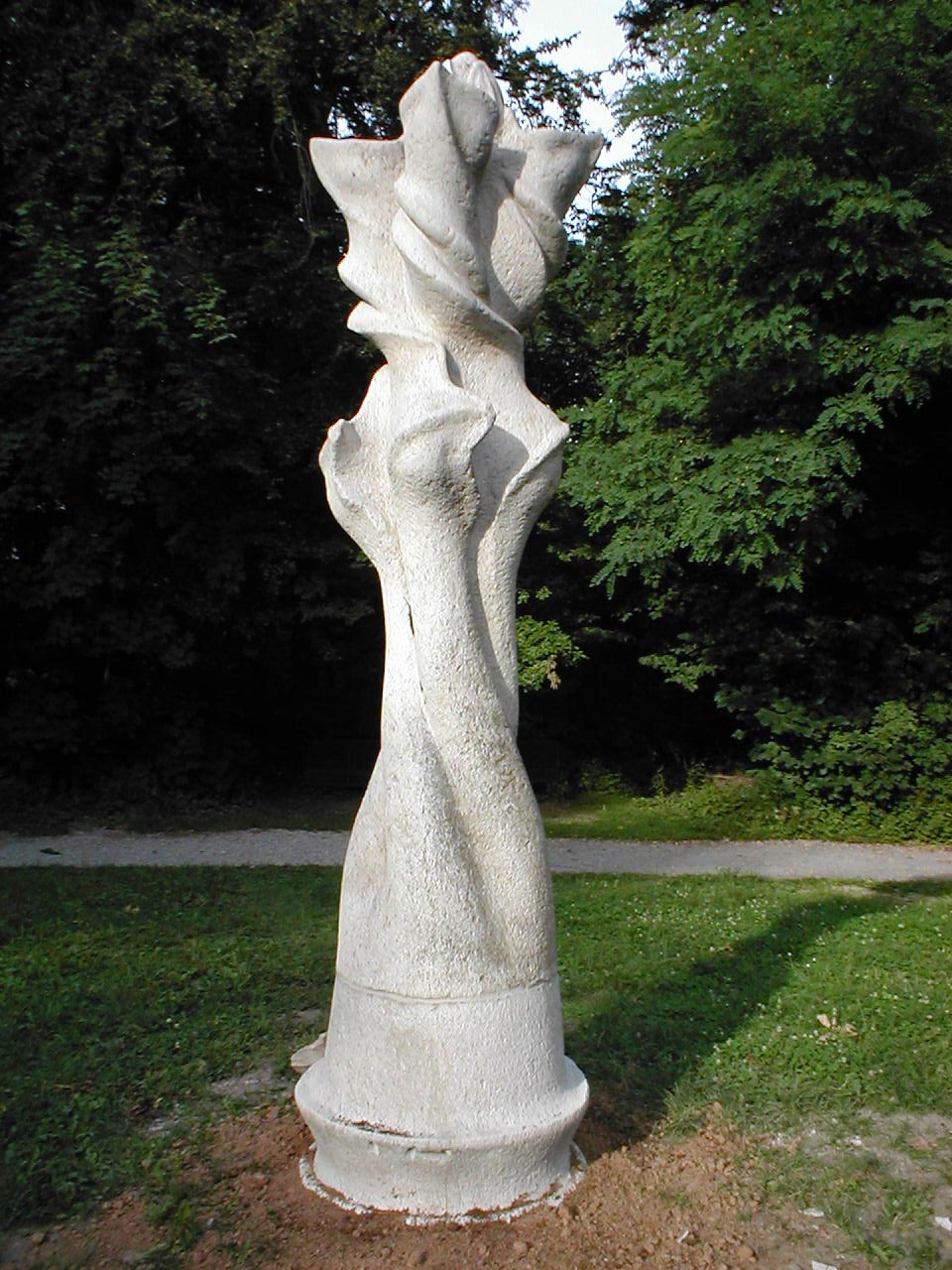 Skulptur "Stein 2000" von Ralf Krämer. Material: Jurakalk. Wartberg Heilbronn.